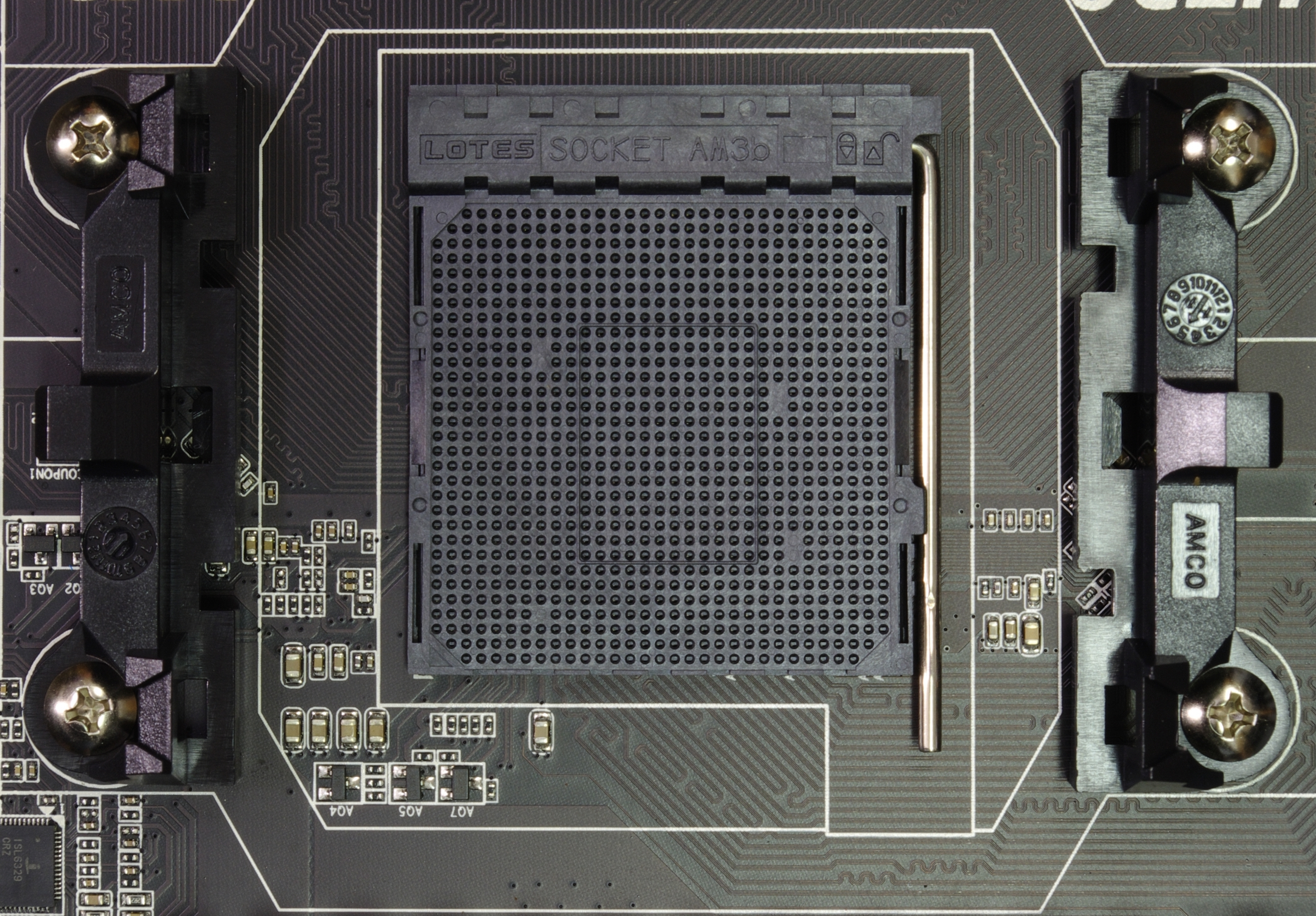 Hauptplatine Gigabyte GA-990FXA-UD3.